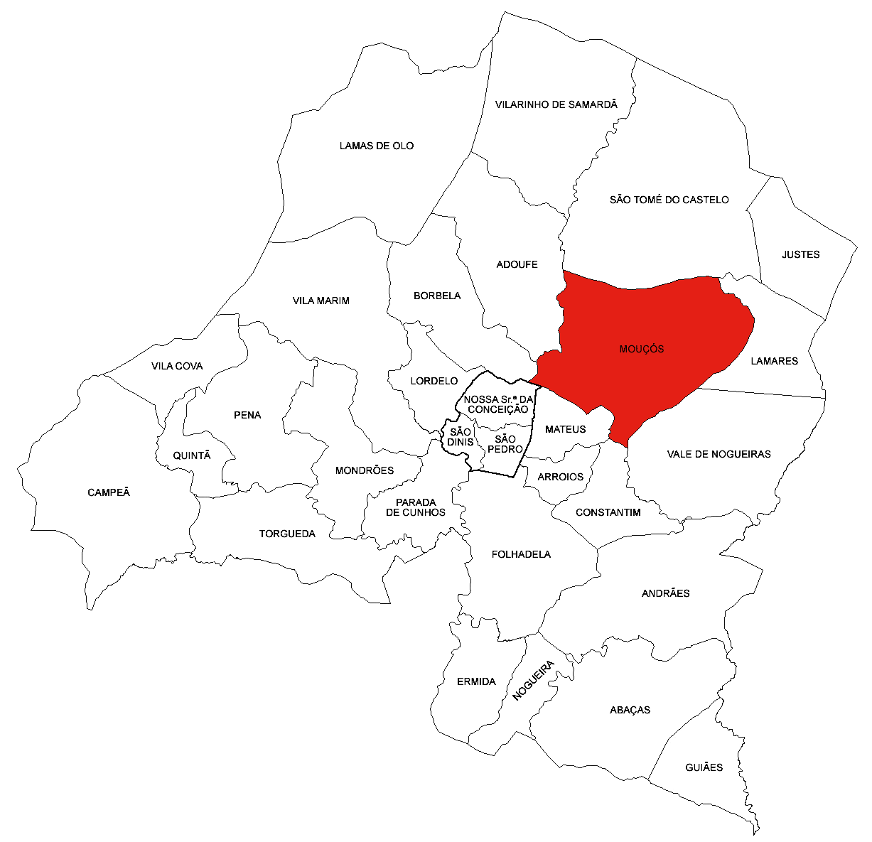 Freguesia de Mouçós (concelho de Vila Real)